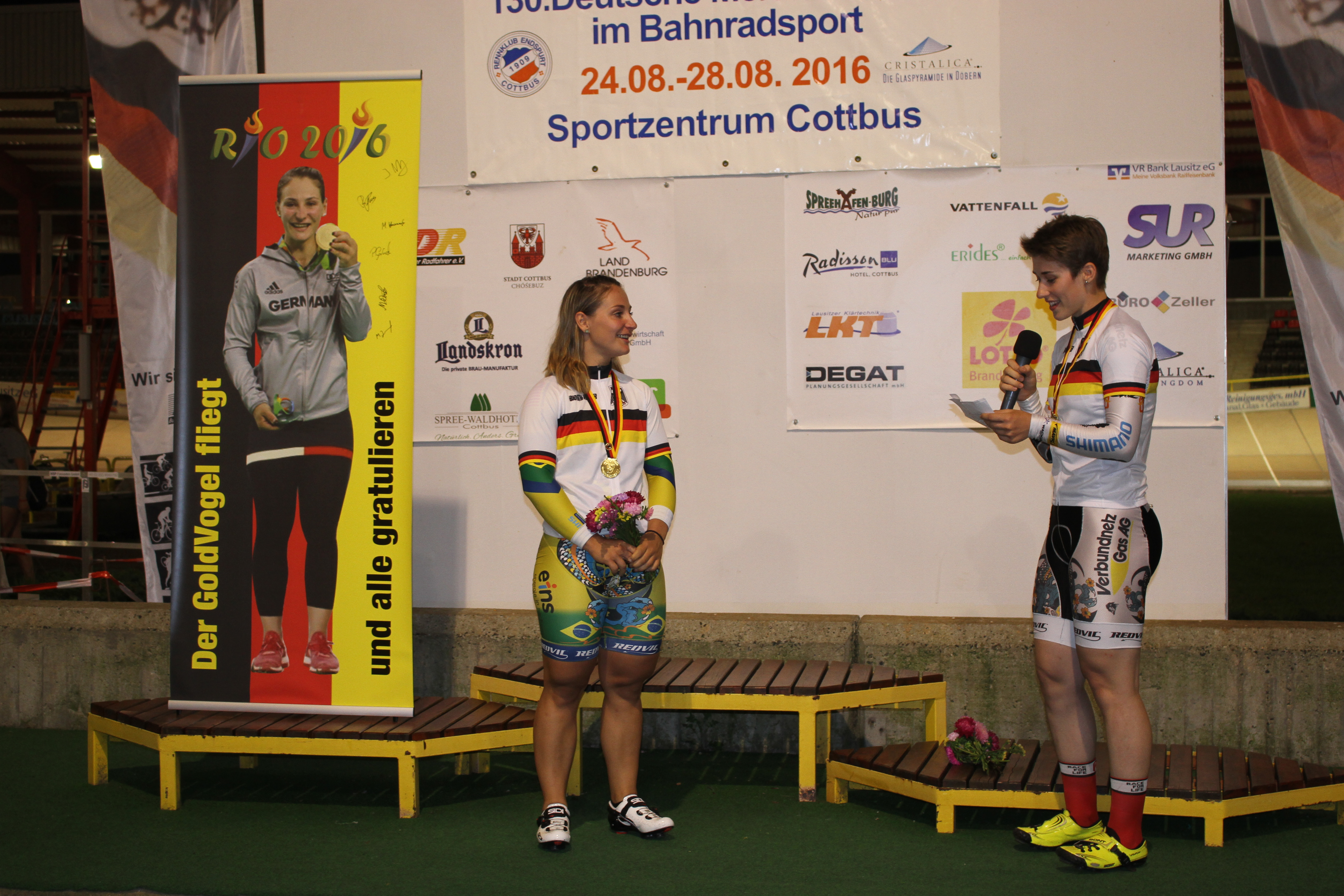 Pauline Grabosch hält eine Rede für Kristina Vogel